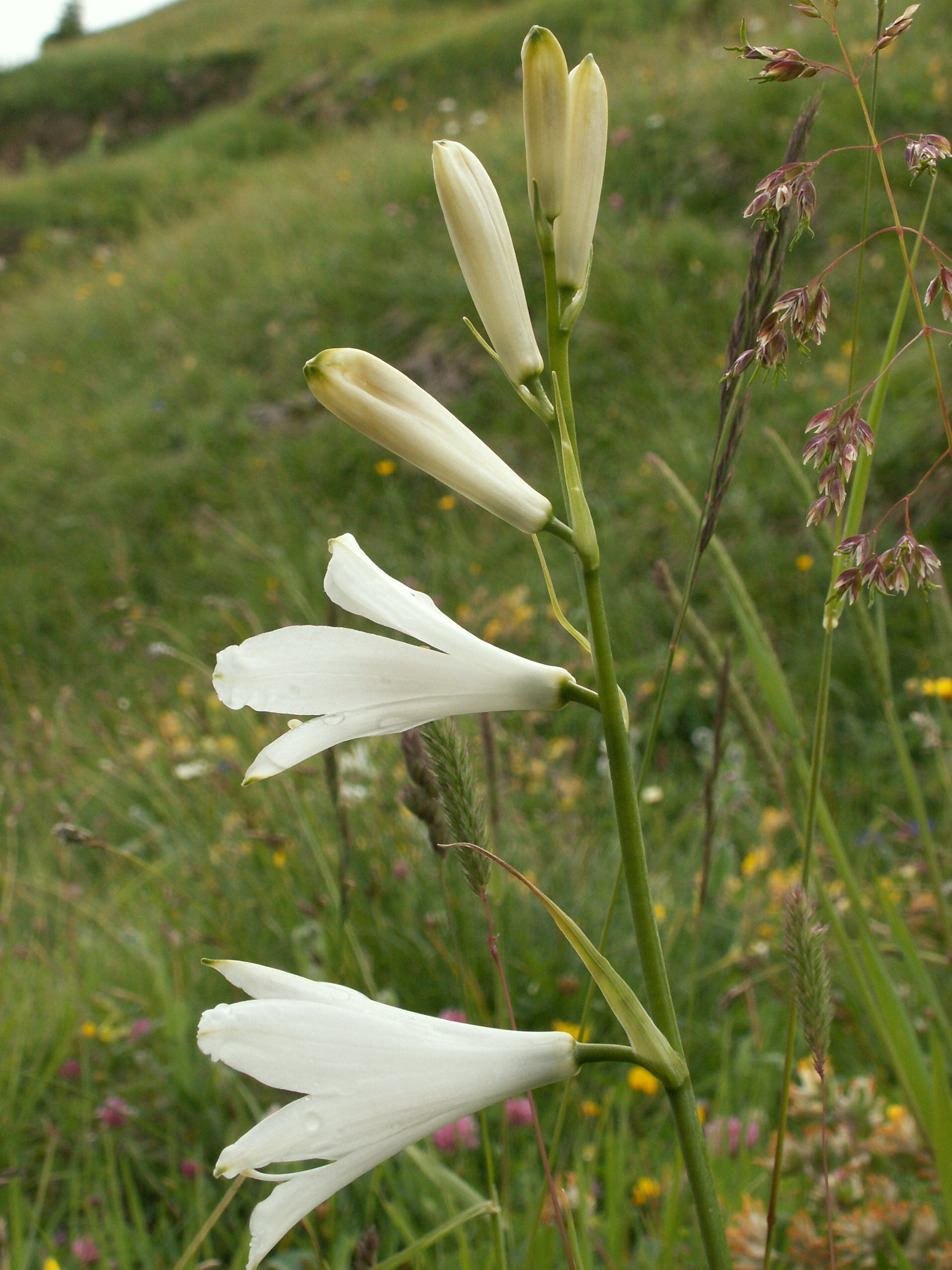 Paradisea liliastrum, Schynige Platte, Kanton Bern, Schweiz